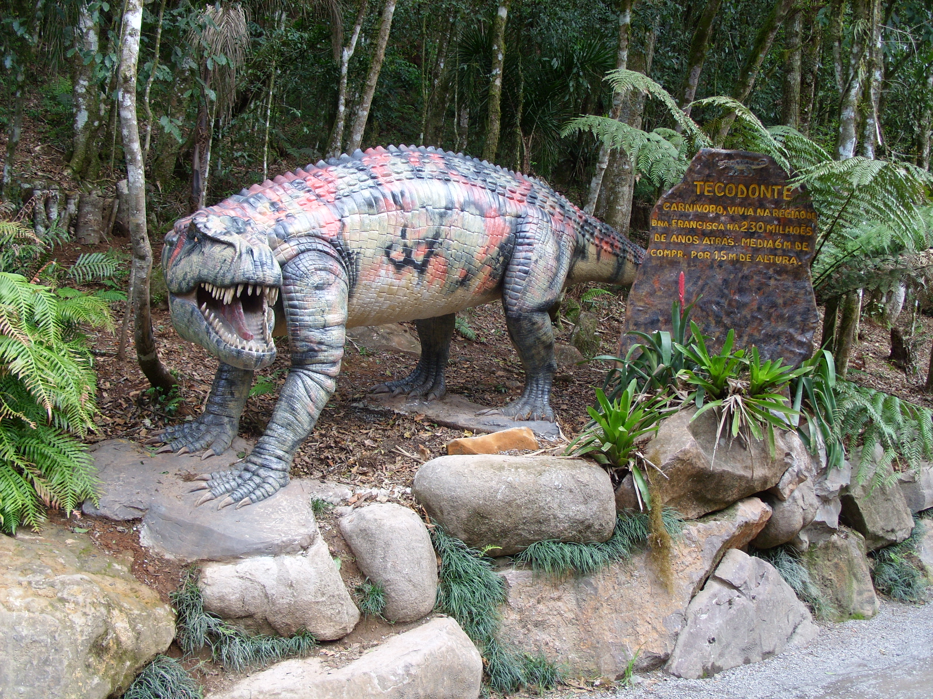 Tecodonte no parque Floribal em Canela, Rio Grande do Sul, Brasil.